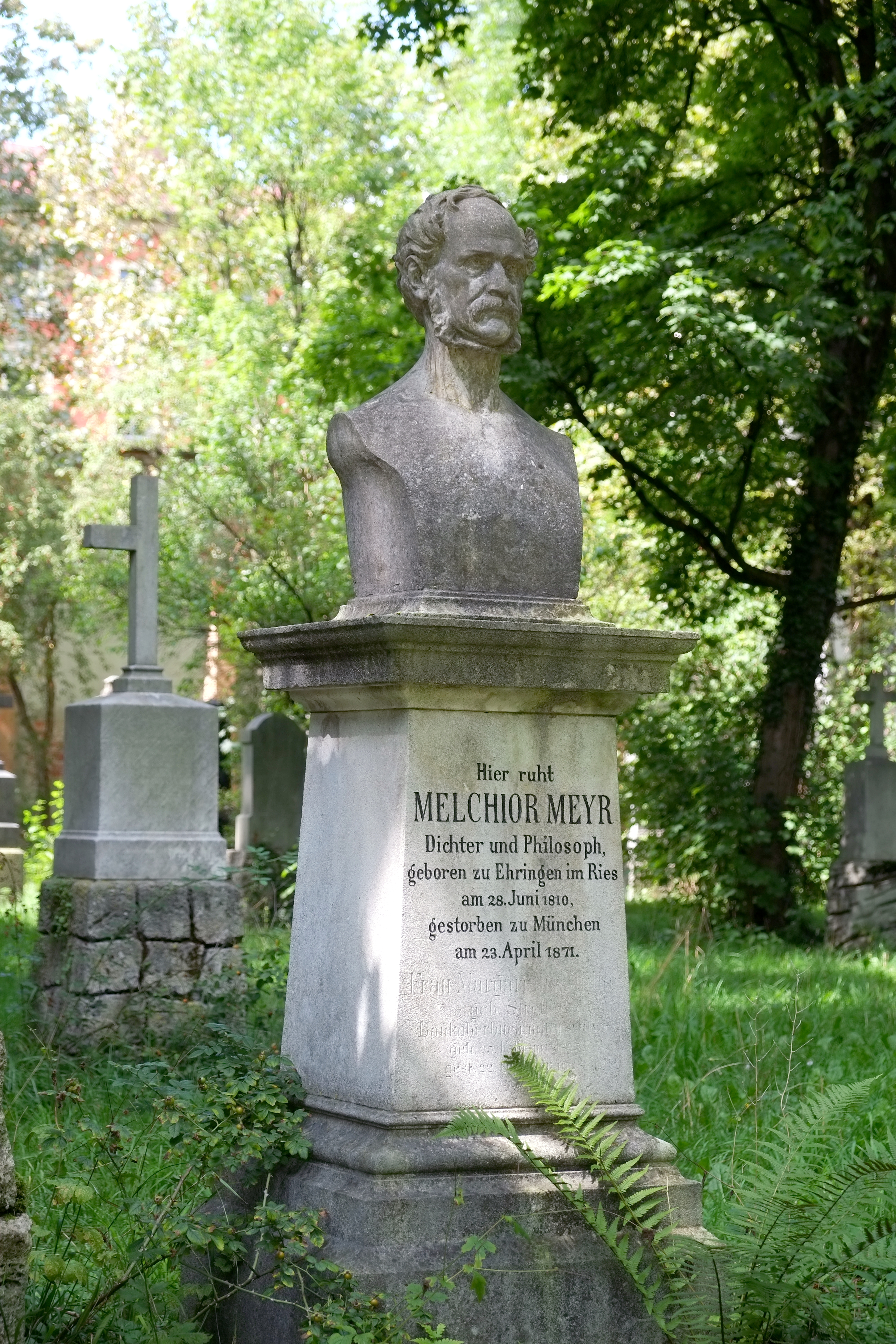 Gedenktafel für Melchior Meyr auf dem Alten Südfriedhof in München (Bayern, Deutschland)